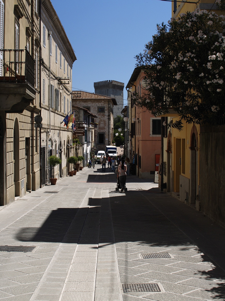 La via principale del paese.